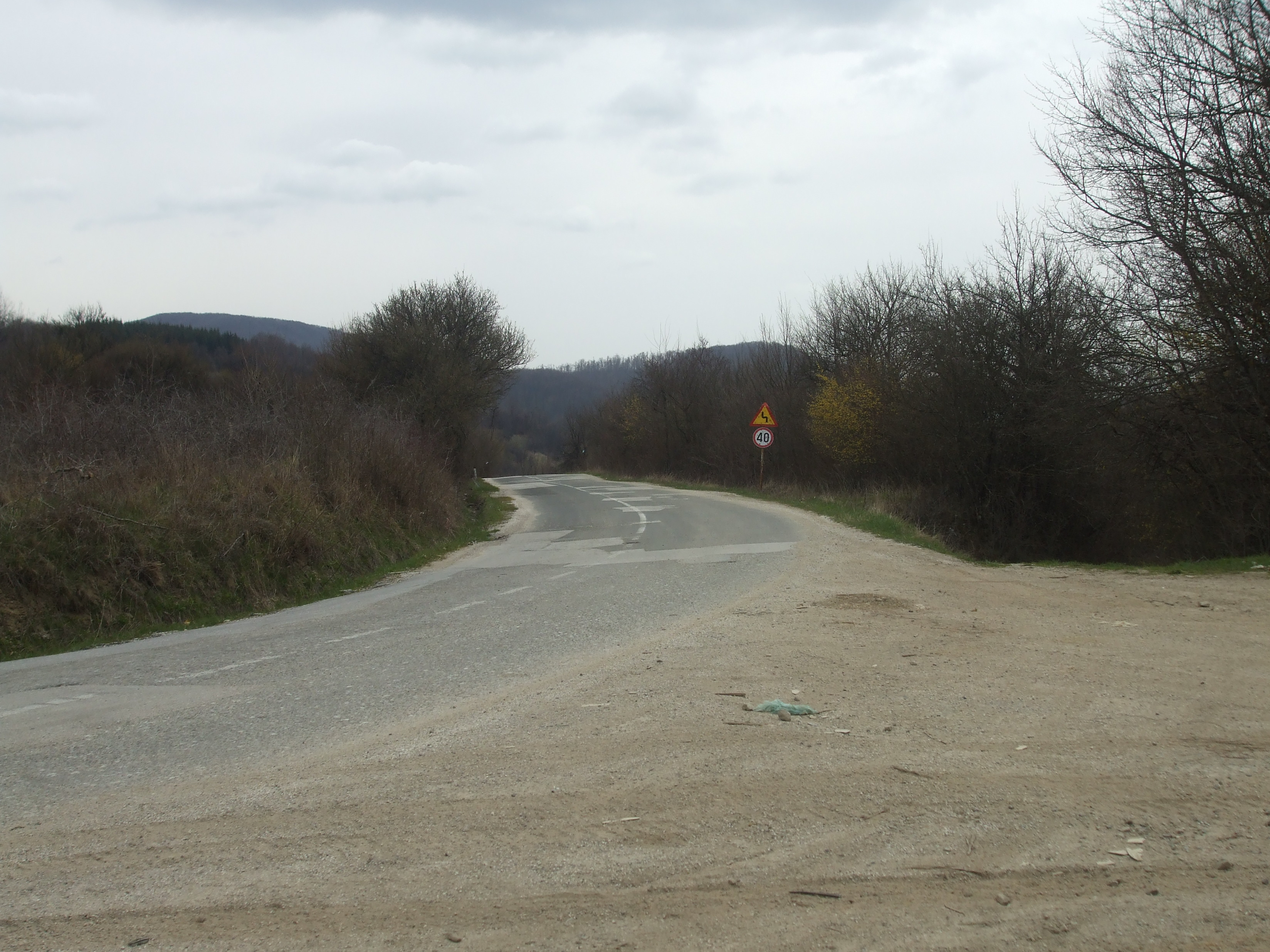 Превој Гоч и раскрсница путева за Врање (право), Власе (лево) и за Трстену (десно). Снимио Драгољуб.